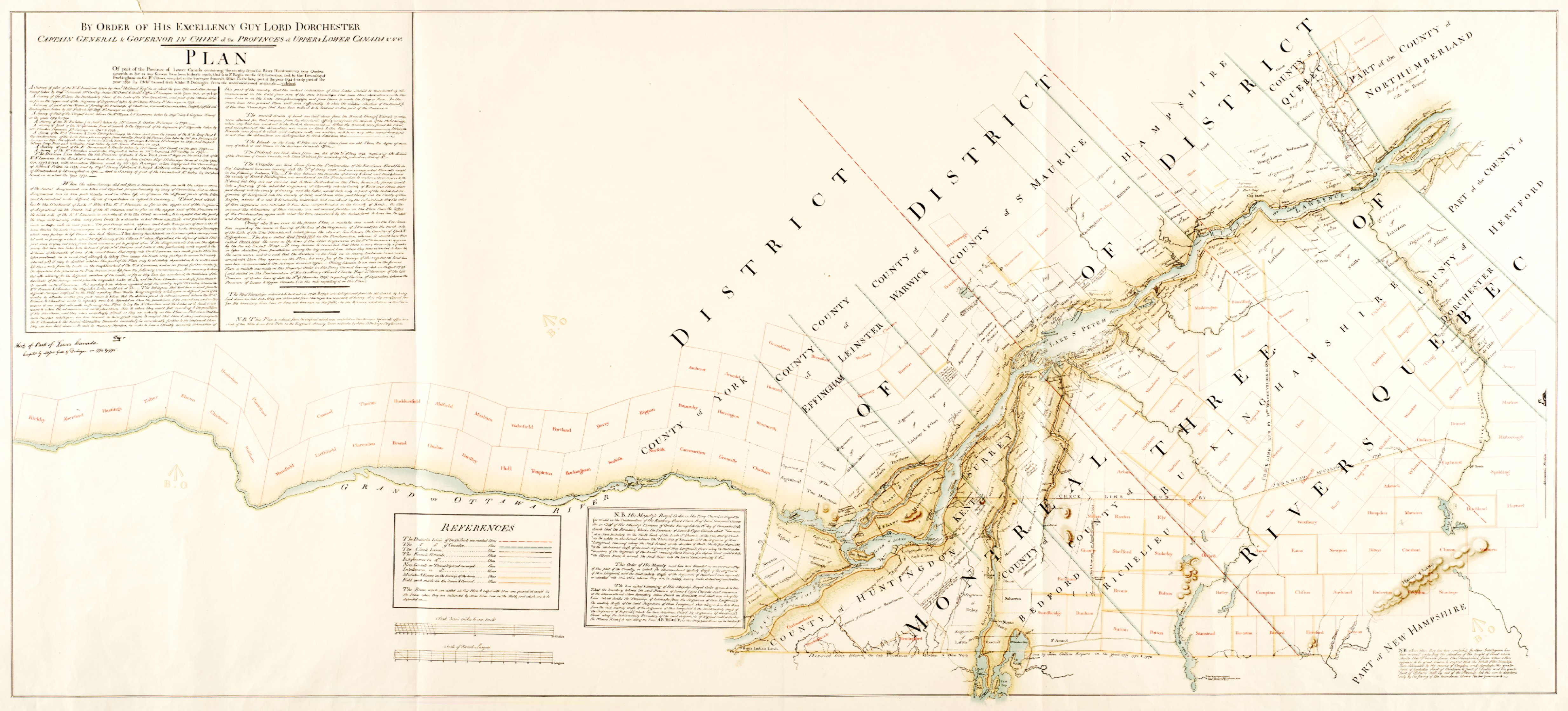 Carte de Gale et Duberger - info